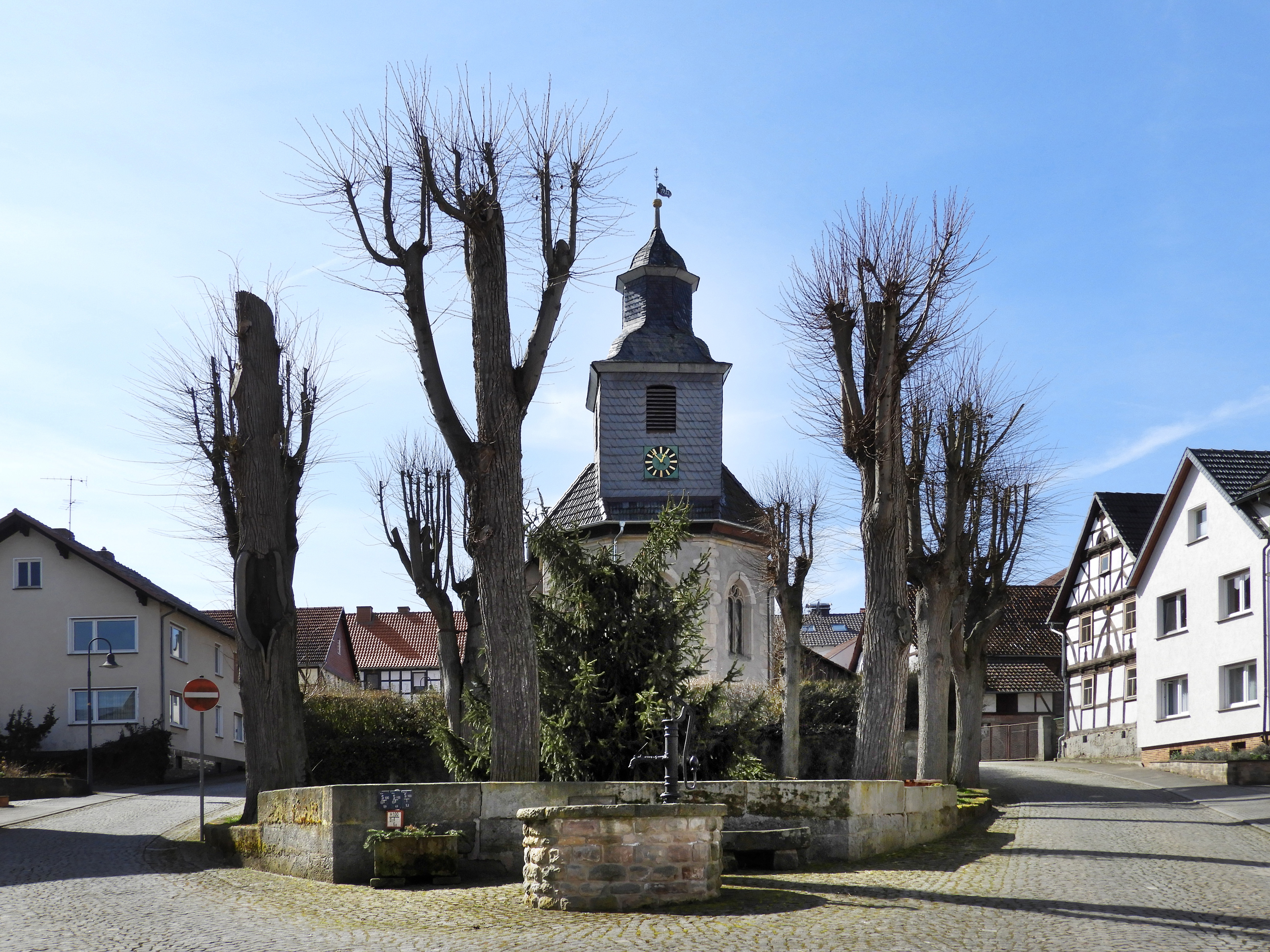 Die erste urkundliche Erwähnung der evangelischen Pfarrkirche von Wolfterode datiert in das Jahr 1334. Der dreiseitige geschlossene Chor wurde in 1515 geweiht. Unterhalb der Kirche befindet sich der ummauerte Anger mit einem erhaltenen Steintisch von der früheren Gerichtsstätte. Neben der in 1936 als Naturdenkmal ausgewiesenen Linde stehen noch weitere Einfassungslinden auf dem Platz. Wegen ihrer künstlerischen, geschichtlichen und städtebaulichen Bedeutung ist das gesamte Ensemble denkmalgeschützt.